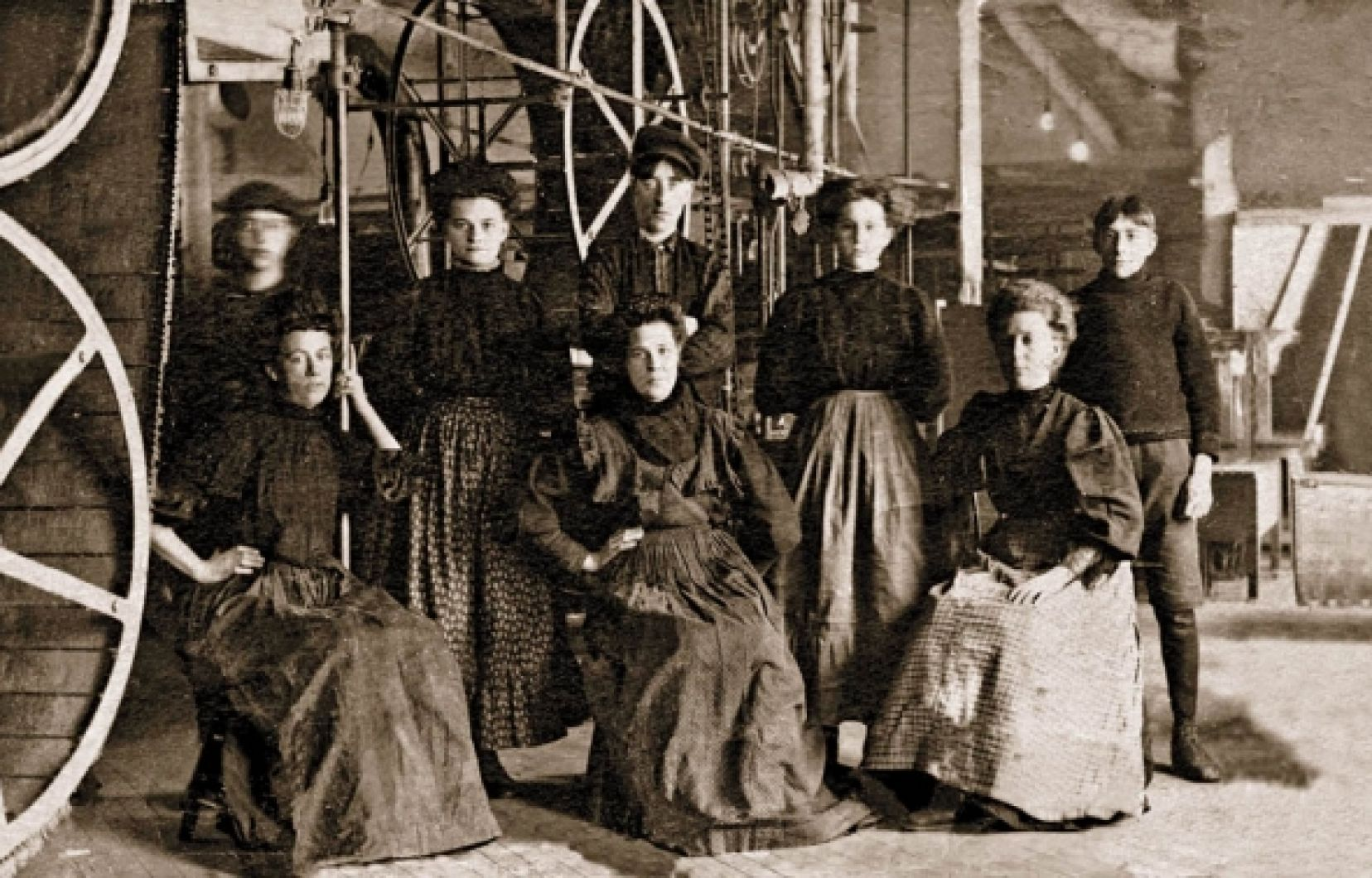 Des allumettières à l’intérieur de l’usine E. B. Eddy, à Hull, vers 1880. On voit à gauche la courroie sur laquelle couraient les allumettes. Les photos dans les fabriques d’allumettes sont rares, car le flash des appareils risquait de provoquer des incendies.